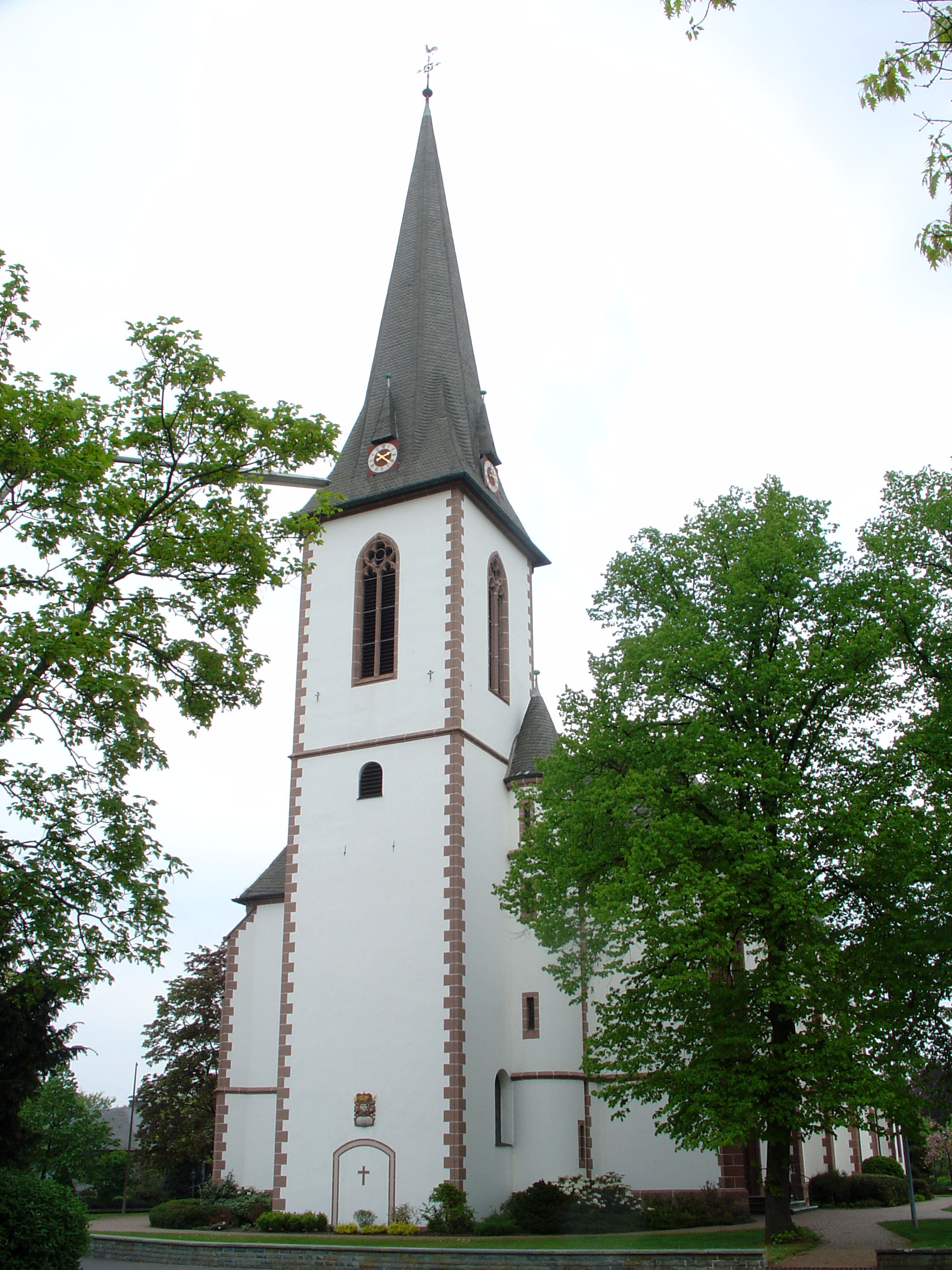 Kirchturm von St. Joseph in Delbrück-Westenholz